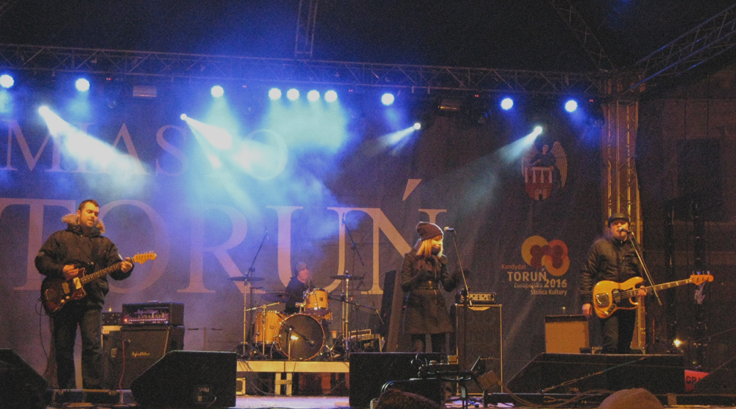 Występ zespołu Big Day na 18. Finale Wielkiej Orkiestry Świątecznej Pomocy w Toruniu